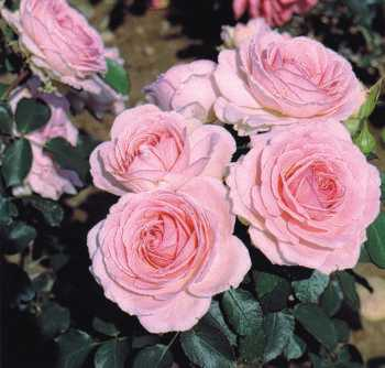 Bild der Rose Mark Twain